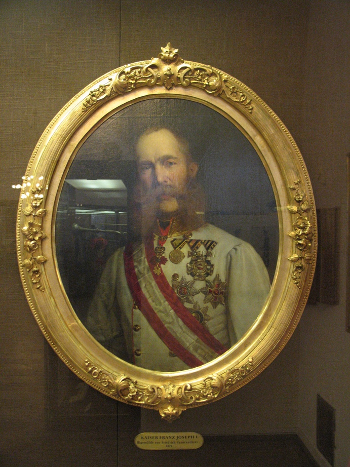 Porträt von Kaiser Franz Joseph I. in Feldmarschall-Galauniform.